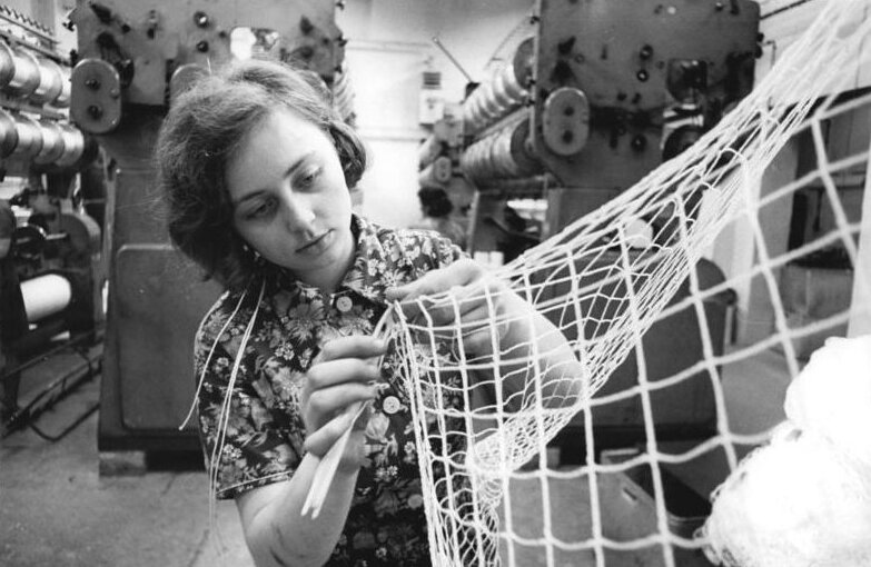 ADN-ZB-Häßler-20.4.72-Bez. Dresden: Erhöhte Leistungen vollbrachten die Wirkerin Edeltraud Wehner und Ihre Kollegen vom VEB Vereinigte Netz- und Seilwerke Heidenau in diesem Jahr, denn ihre Seide und Fischereinetze sind zum Teil für Vietnam bestimmt. Allein im letzten Quartal stellten die Arbeiter 18 Tonnen Seile und Netze zusätzlich her, die asuschließlich nach Vietnam entsandt wurden. Die 600 Werktätigen des Betriebes verbinden ihre Anstrengungen in der Produktion mit schärfstem Protest gegen die erneuten Bombenanschläge auf die Bevölkerung der DRV. "Wir solidarisieren uns mit den Patrioten in Vietnam und werden unseren Brüdern alle Erzeugnisse pünktlich liefern", heißt es in einer Erklärung.